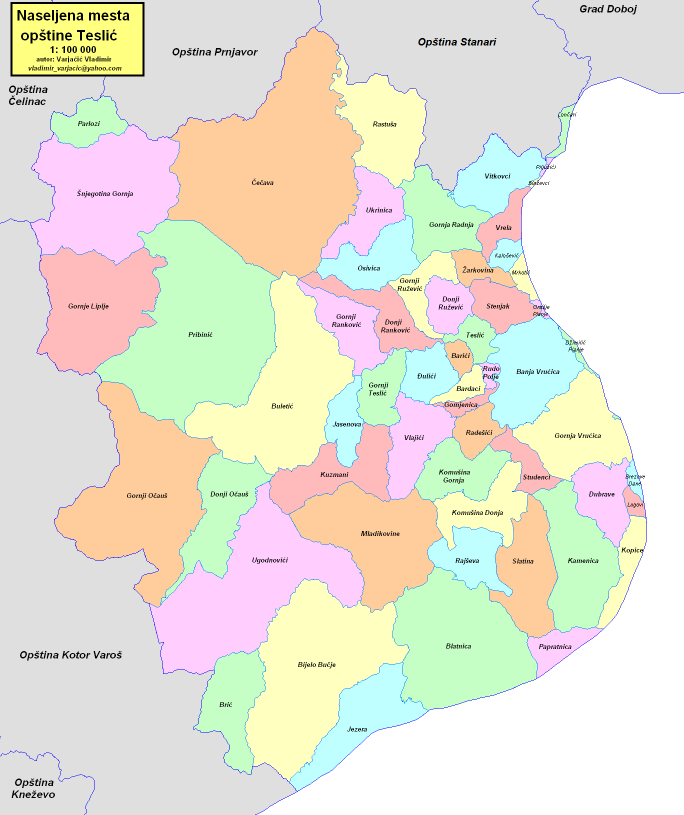 Opština Teslić